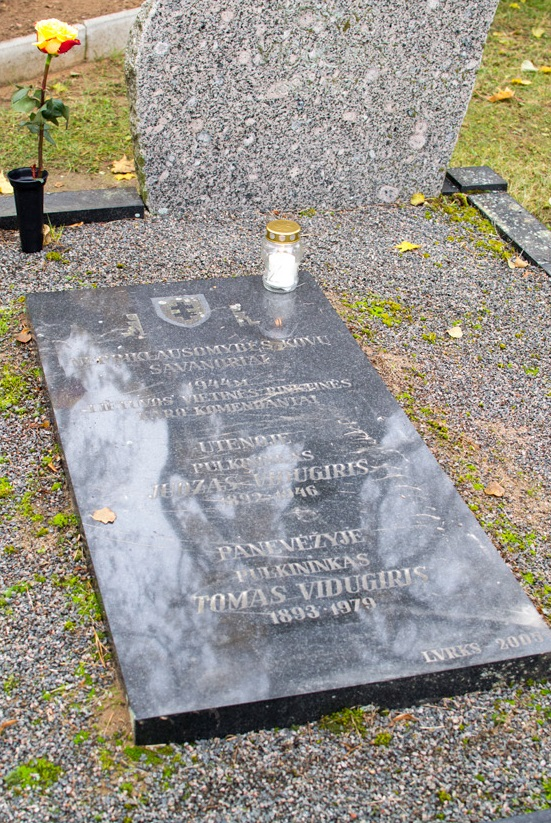 Brolių Juozo ir Tomo Vidugirių kapas Palaukiuose